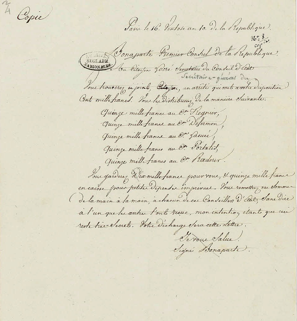 Minute d’une lettre de Napoléon à Jean–Guillaume Locré, secrétaire général du Conseil d’État (1799–1815), lui demandant de répartir très discrètement une somme de 100 000 francs entre cinq conseillers d’État